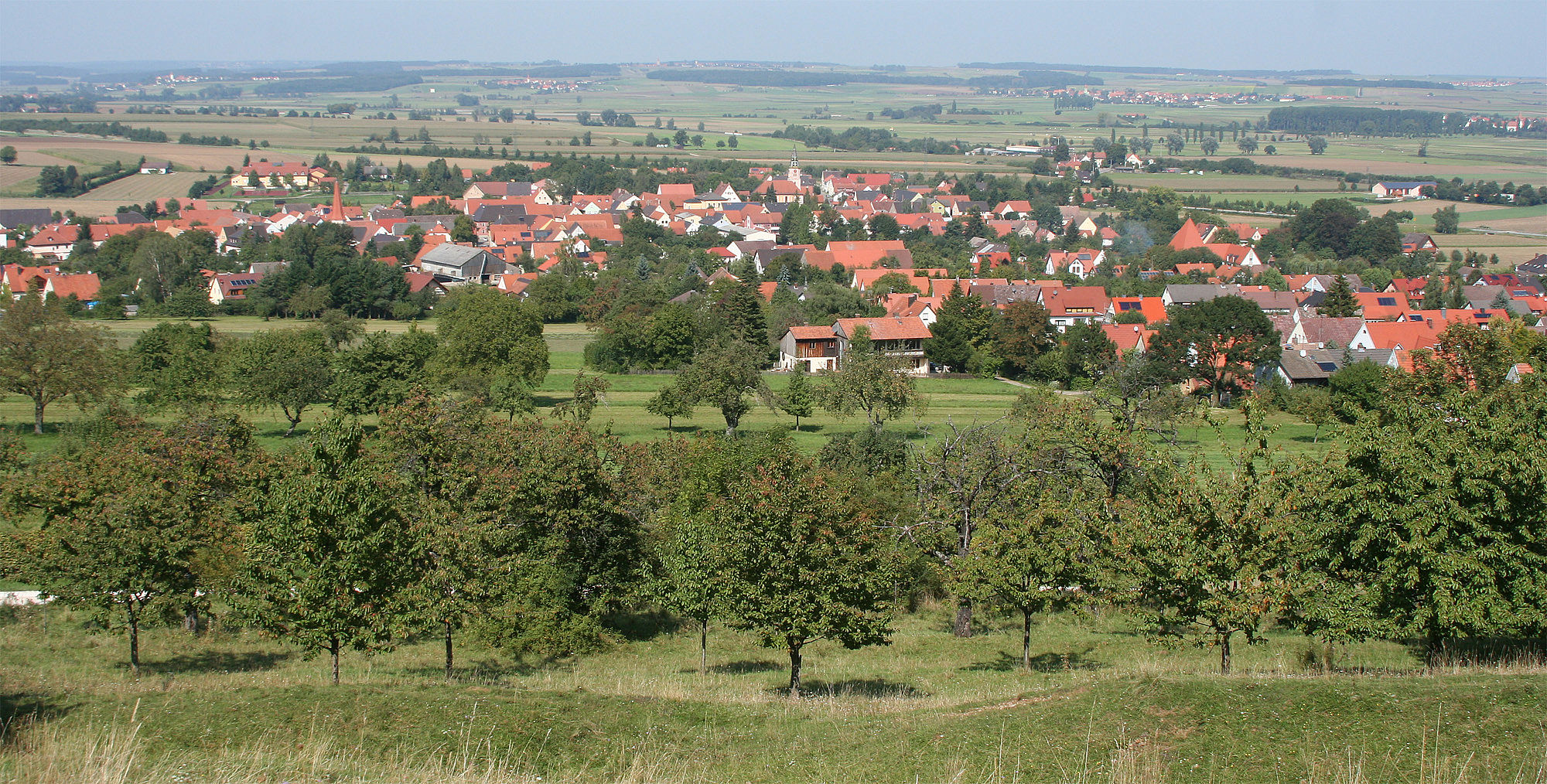 Blick auf den Ortskern von Markt Berolzheim von der Buchleite aus; Streuobstwiese im Naturschutzgebiet „Buchleite bei Markt Berolzheim“